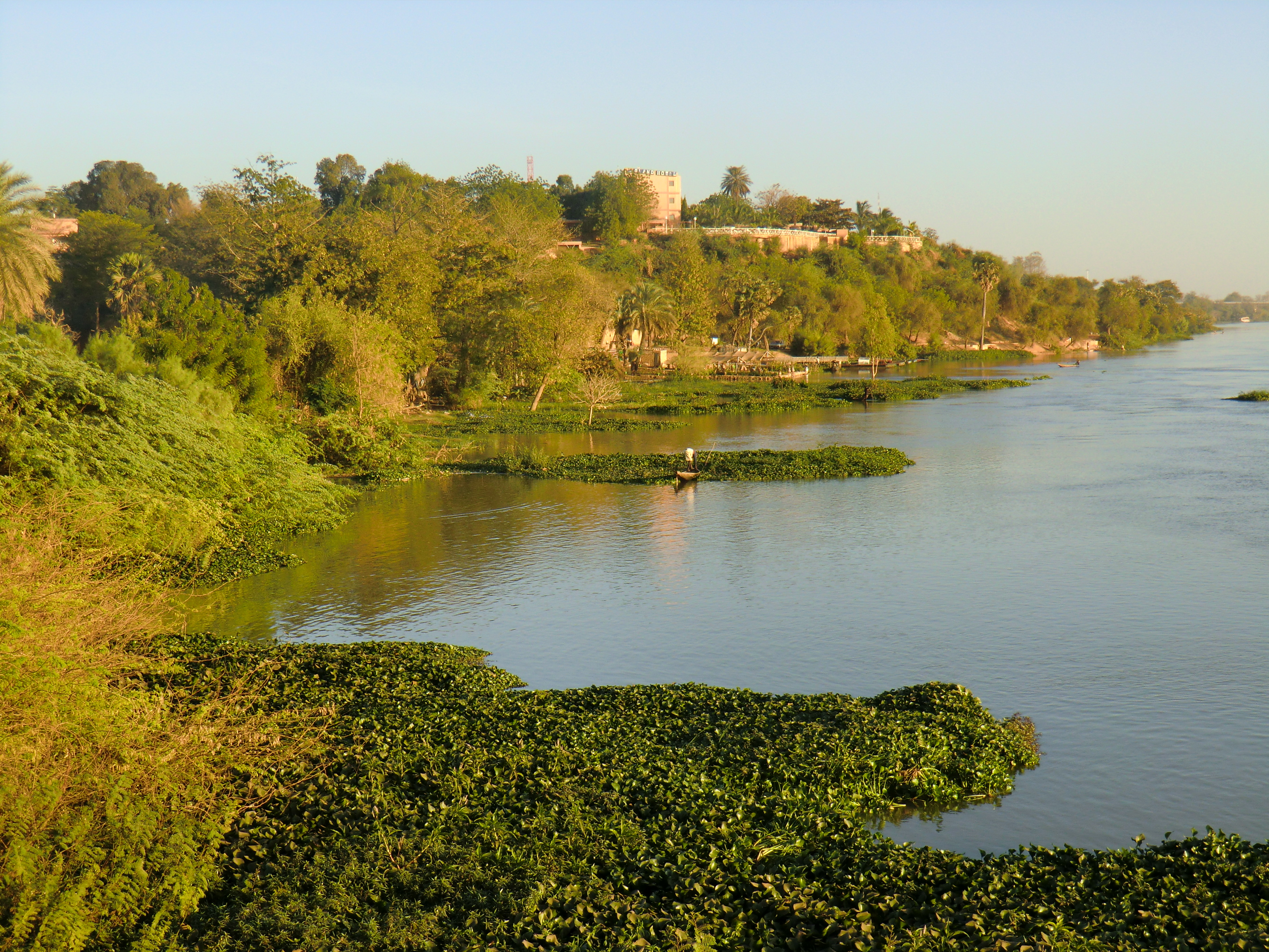 Vue depuis le pont Kenney